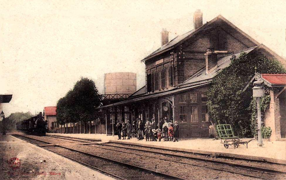 Train entrant en gare.